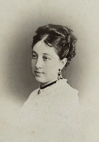 Юлия Гавриловна Сушкова, ур. Арсеньева (1838-1883)